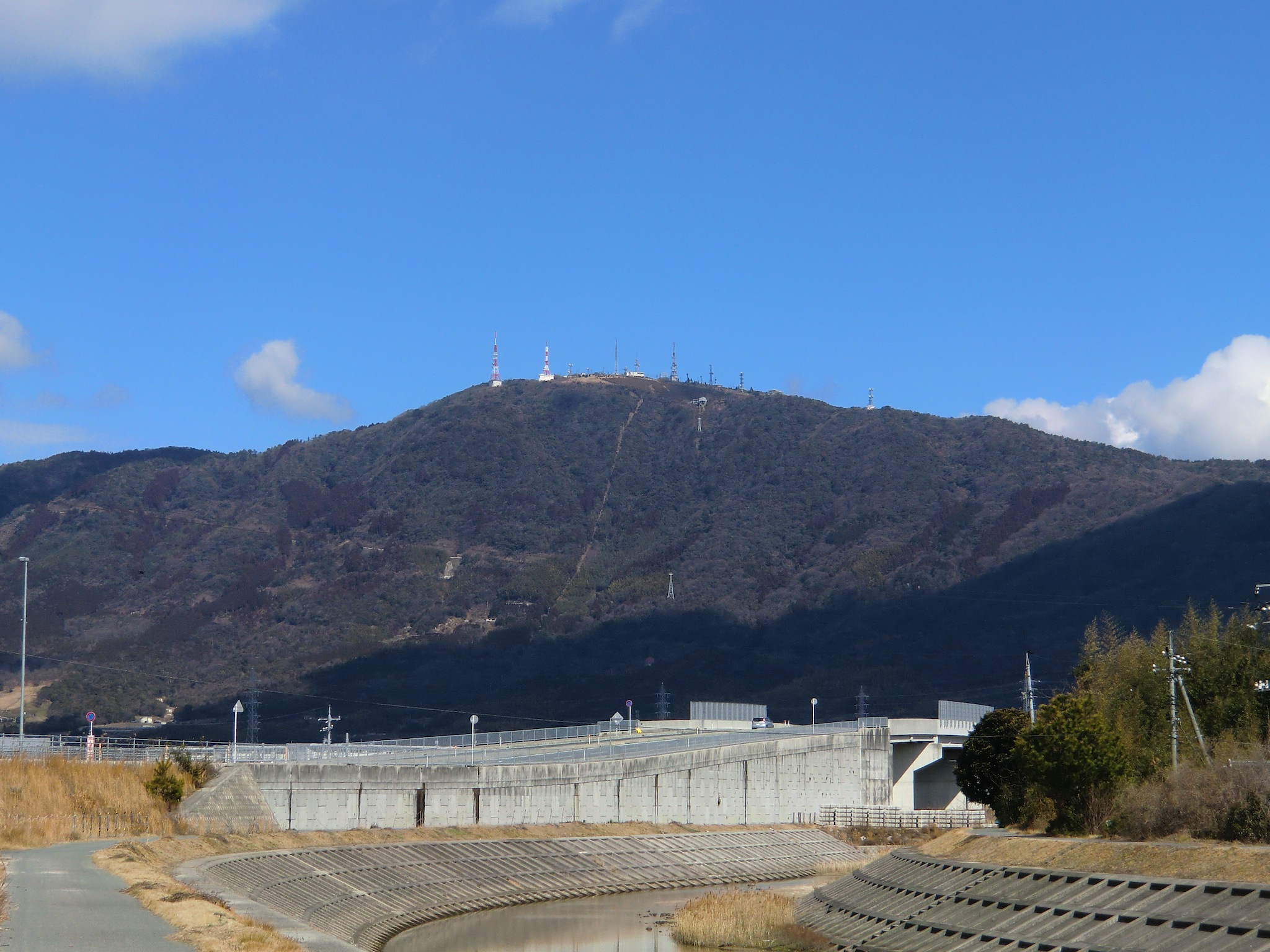 防府市大平山の遠景。